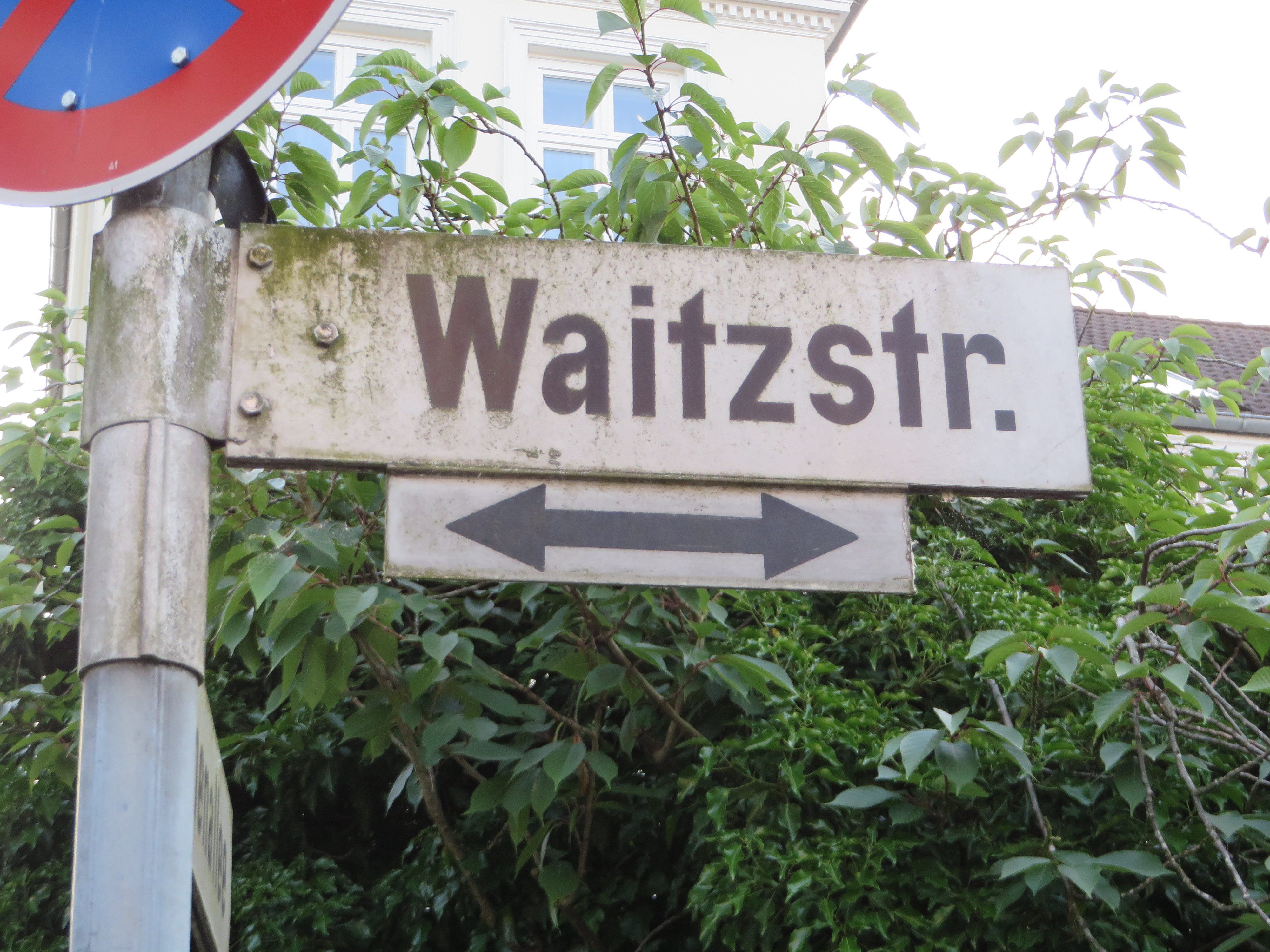 Straßenschild Waitzstraße (Flensburg)